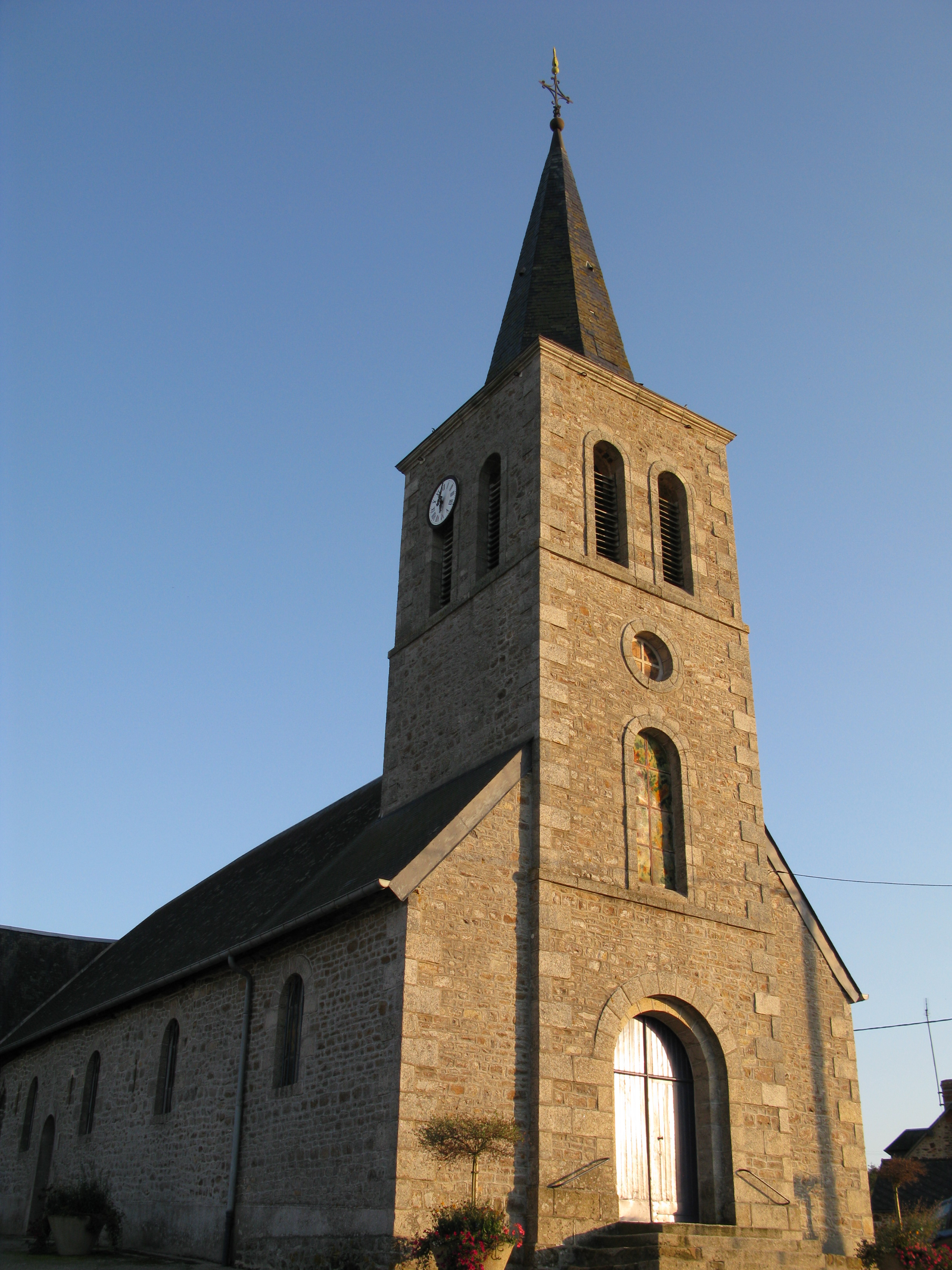 L'église du Ham en Mayenne.